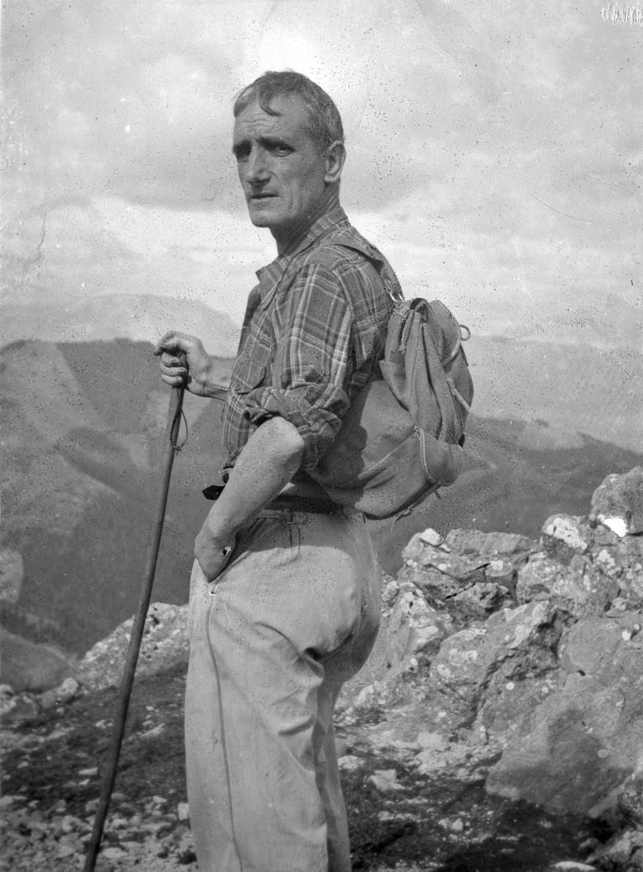 Indalecio Ojanguren argazkilari eta mendizale Eibartarra Elgetako Egoarbitza mendiaren gailurrean 1943. urtean. Argazkiaren kudeaketa Gipuzkoako Foru Aldundiko Kultura eta Euskara Departamentuko eskuetan dago.